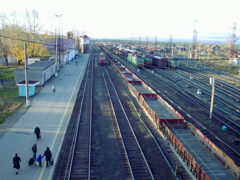 Ст. Гороблагодатская, Свердловская ж.д.